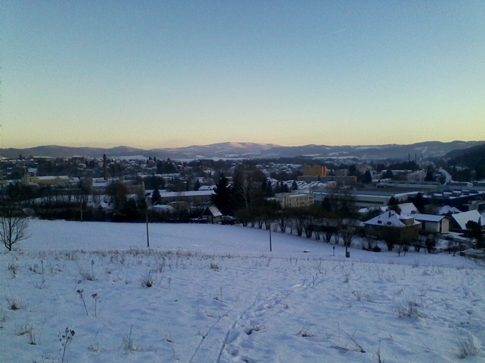 Pohled na Hronov z Jírovy Hory.